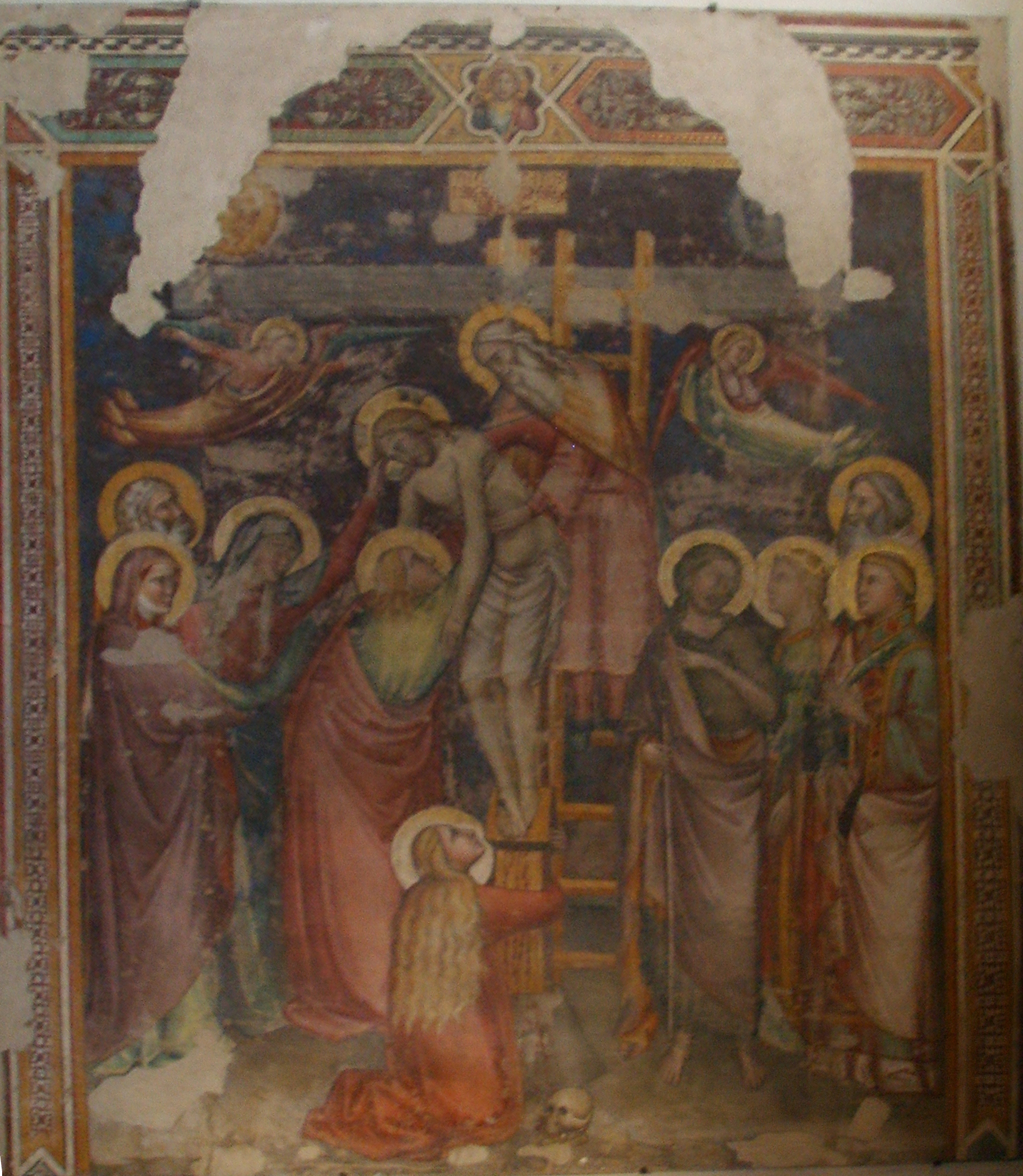 Sant'Ambrogio church, Niccolò Gerini, Deposizione In Florence, italy